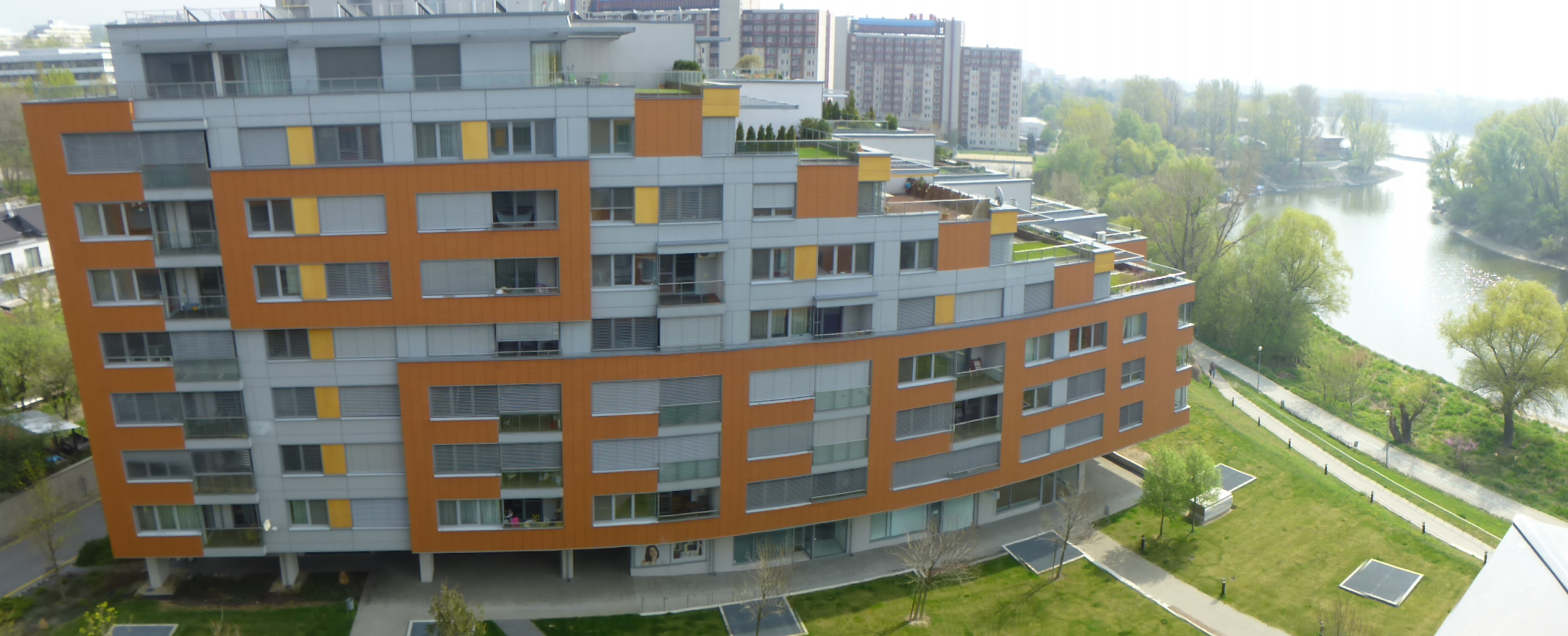 BYTOVÝ DOM KARLOVESKÉ RAMENO